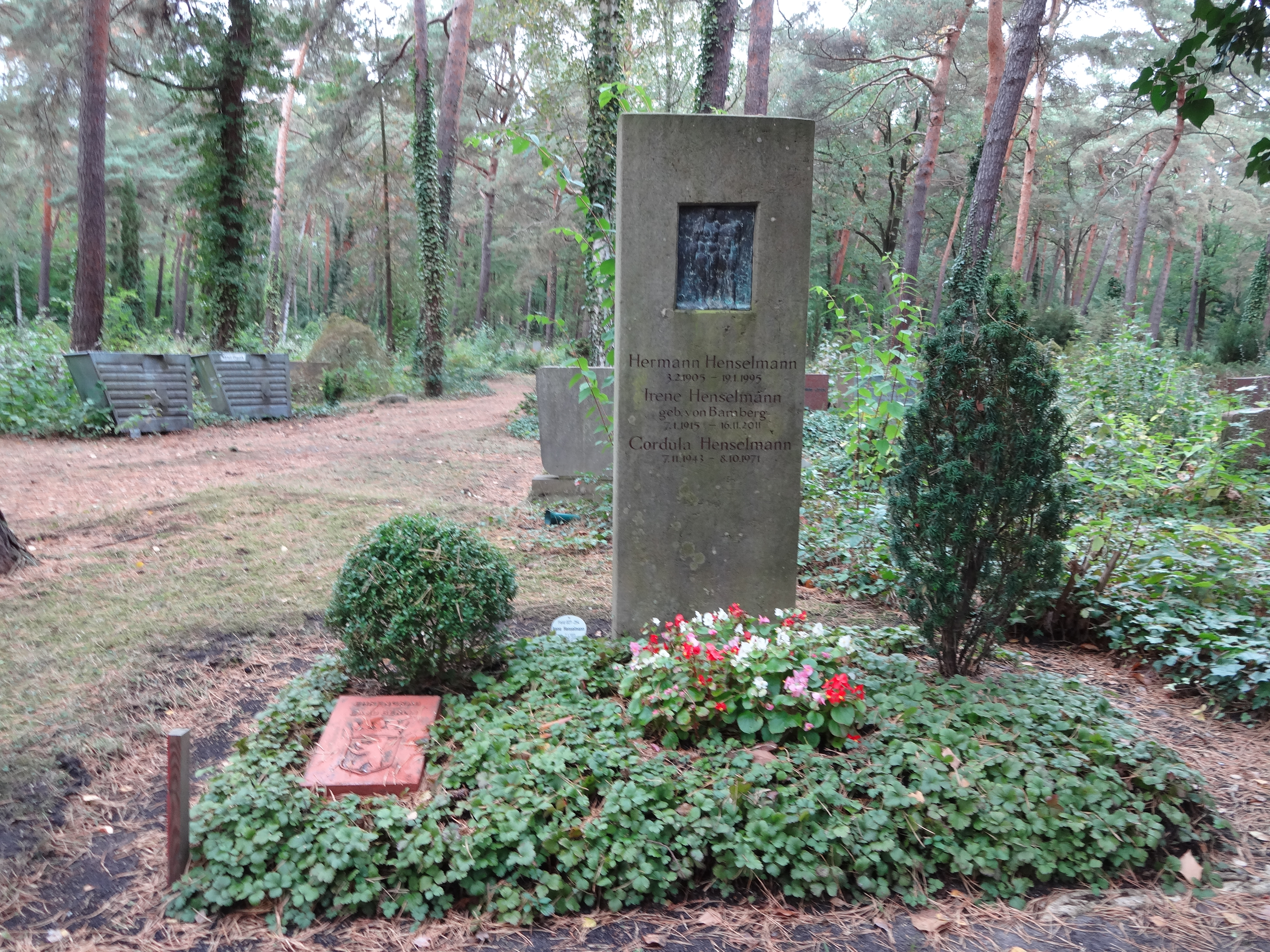 Grab von Prof. Hermann Henselmann auf dem Waldfriedhof Zehlendorf, Ehrengrab